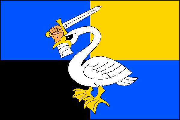 Vlajka obce Křtěnov